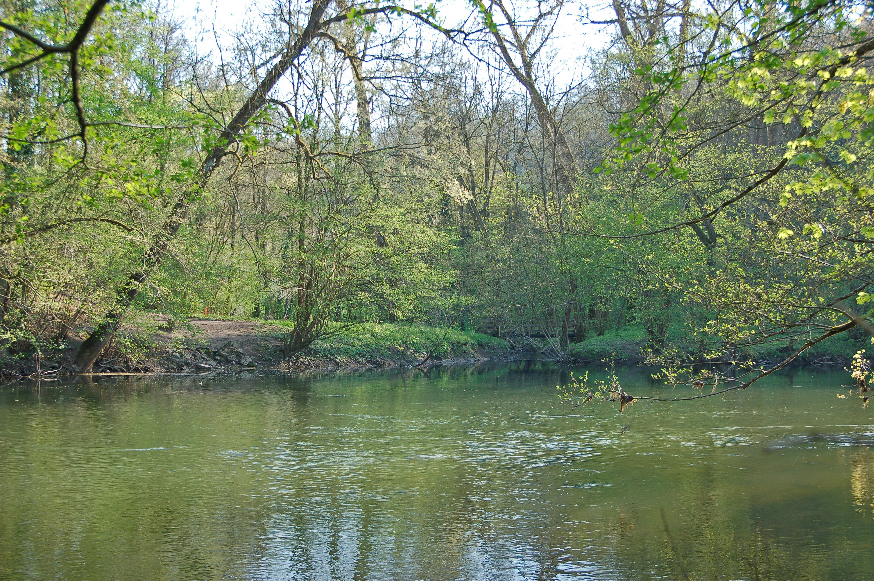 Leudelsbachmündung in die Enz am Markgröninger Badplatz (von den Remminger Lachenwiesen gesehen)